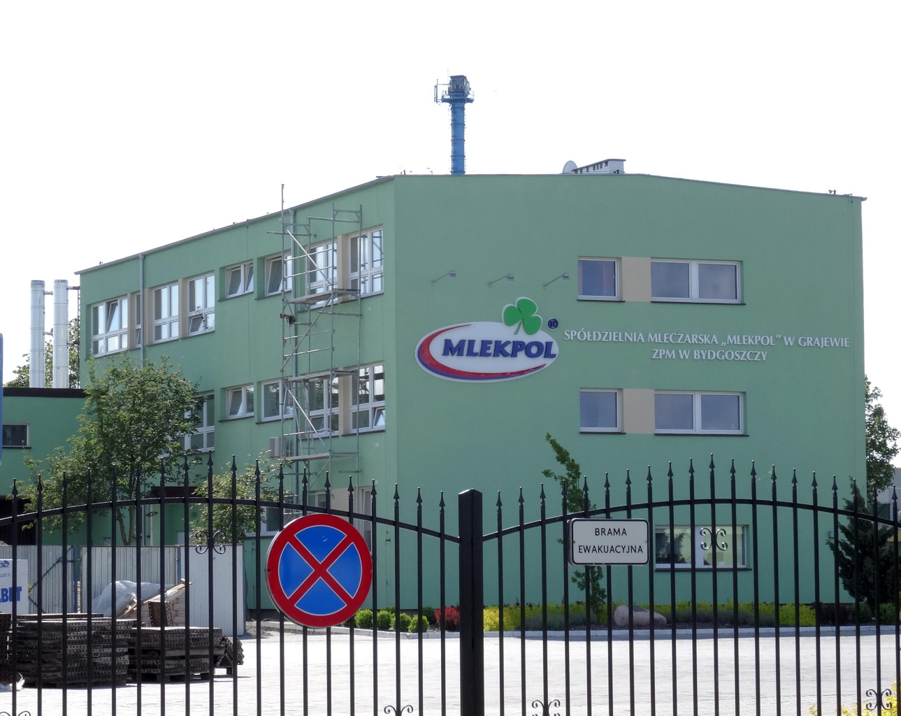 Mlekpol Spółdzielnia Mleczarska w Grajewie Oddział Zakład Produkcji Mleczarskiej w Bydgoszczy przy ul. Niklowej 4 w Bydgoszczy (Osowa Góra)